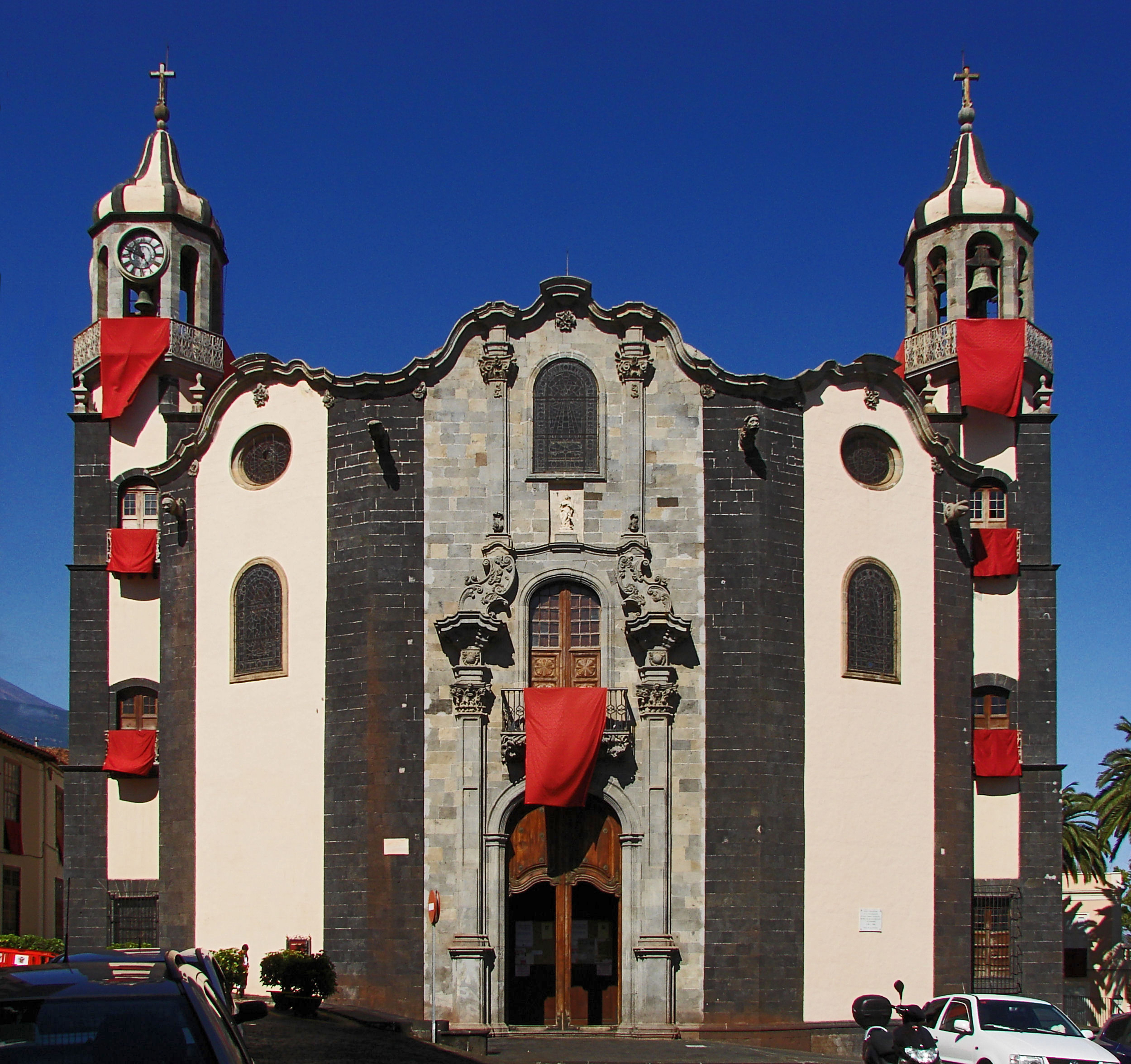 Fachada Este de la Iglesia de la Concepción de La Orotava